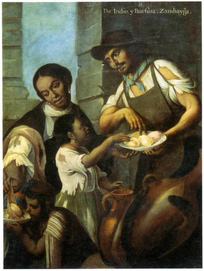 Pintura de Castas, 13. De indio y barcina – Zambaiga.